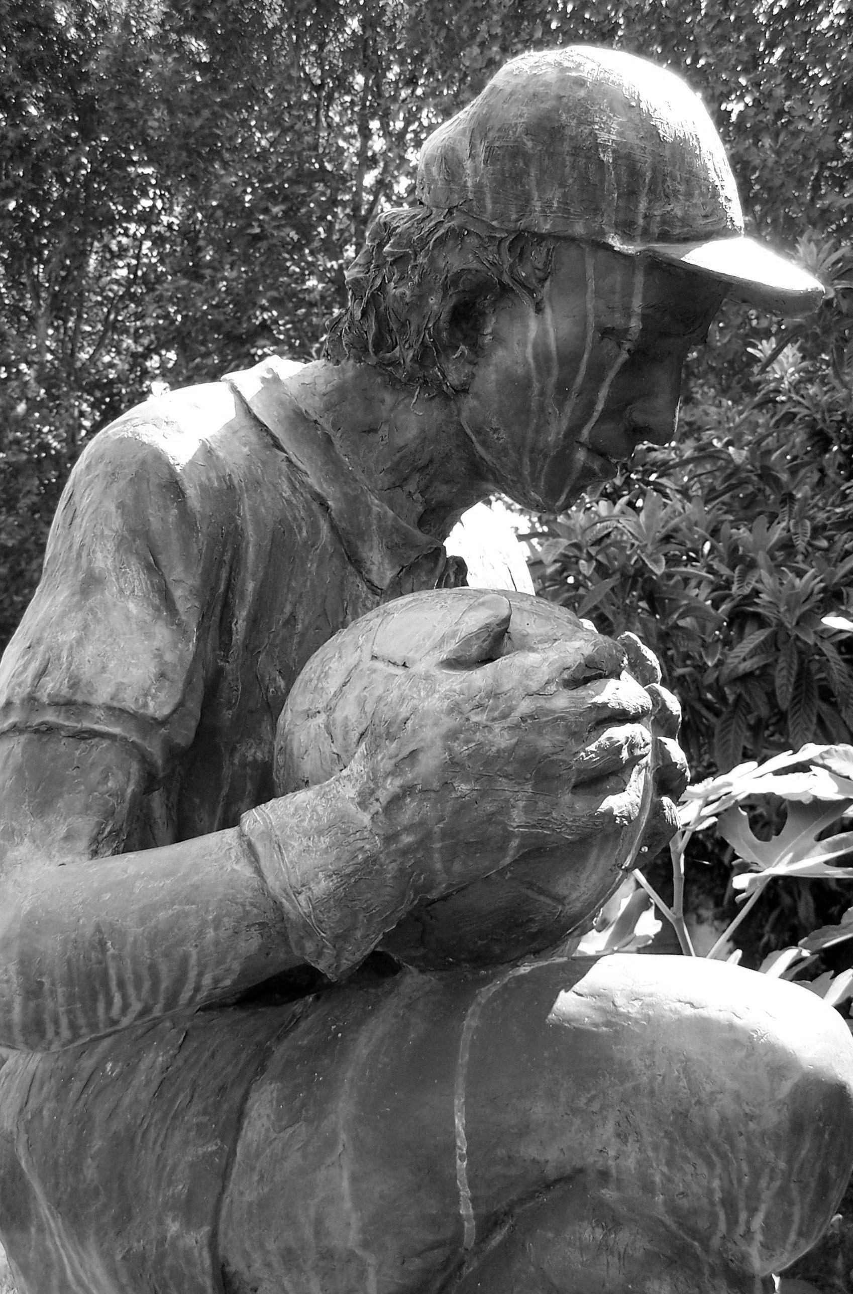 Monumento "Il calciatore" This is a photo of a monument which is part of cultural heritage of Italy.